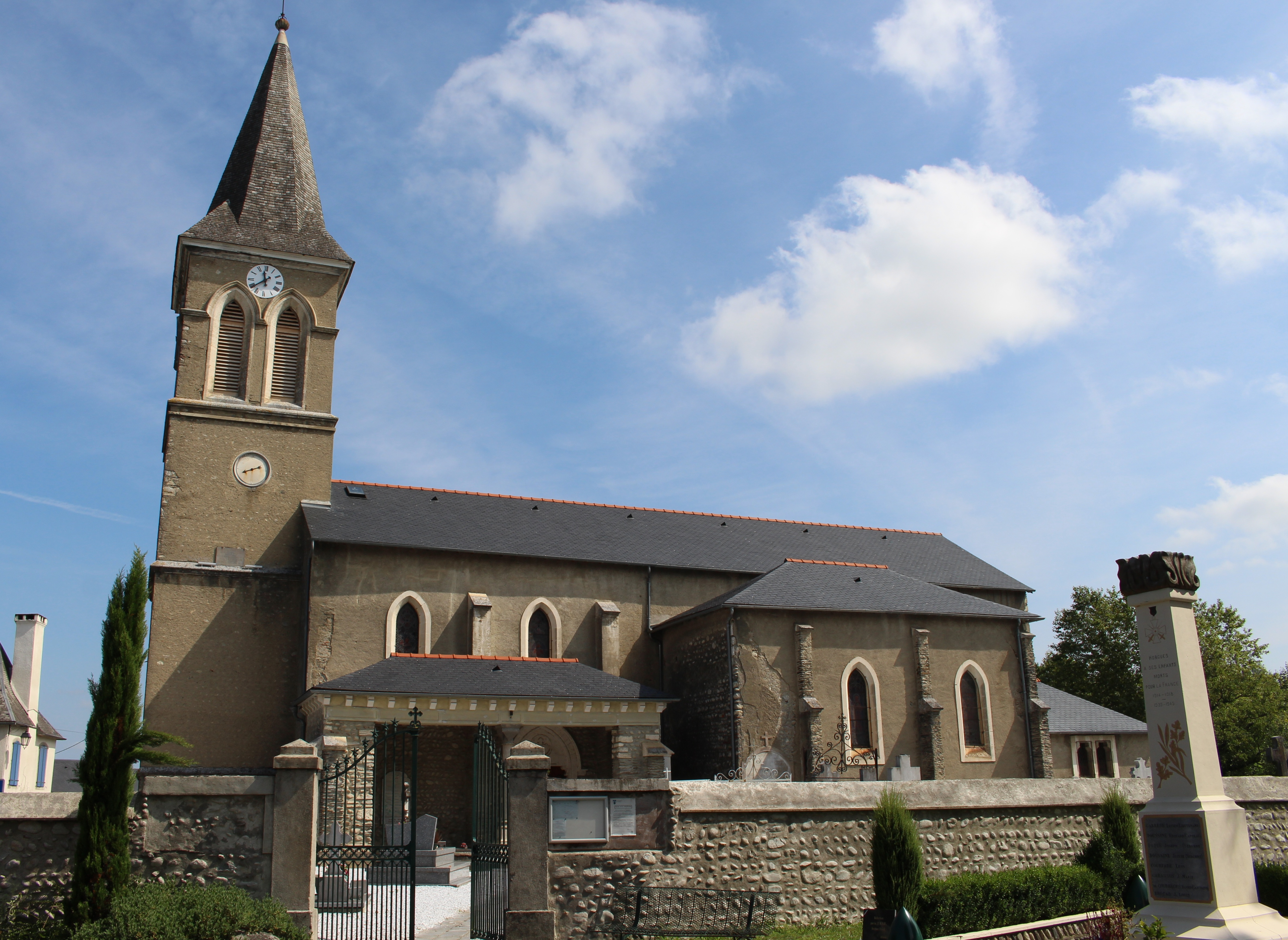 Église Saint-Mauront de Horgues (Hautes-Pyrénées)